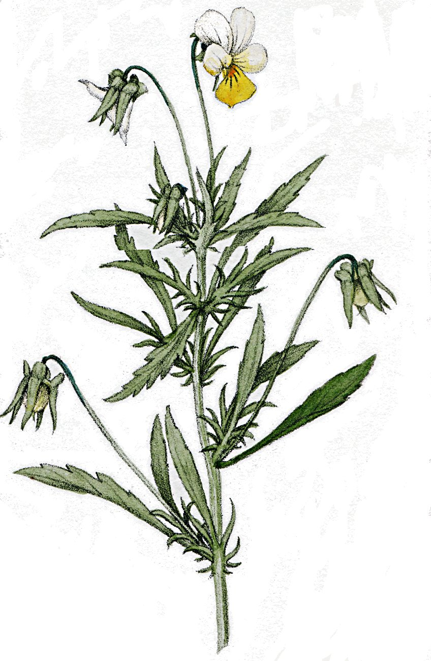 Dictionaire des plantes suisses 1853 Scanné par Utilisateur:Greatpatton